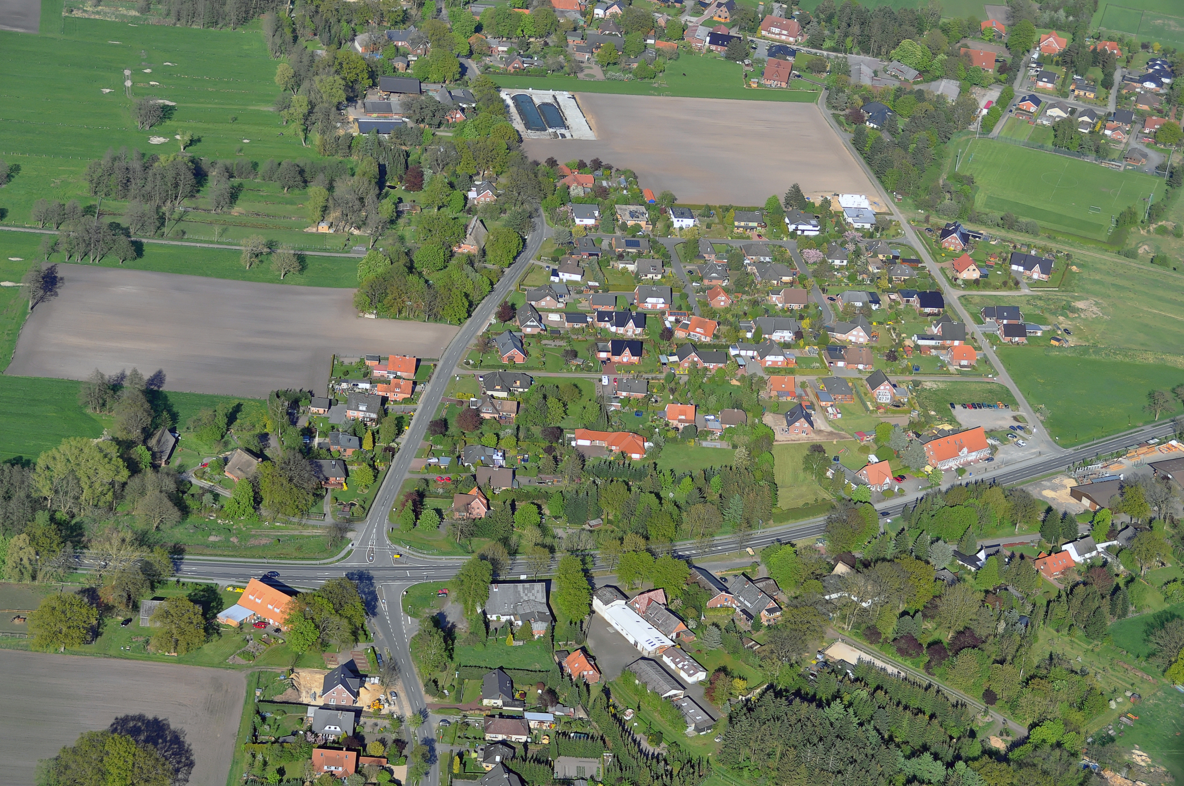 Luftbilder von der Nordseeküste 2012-05